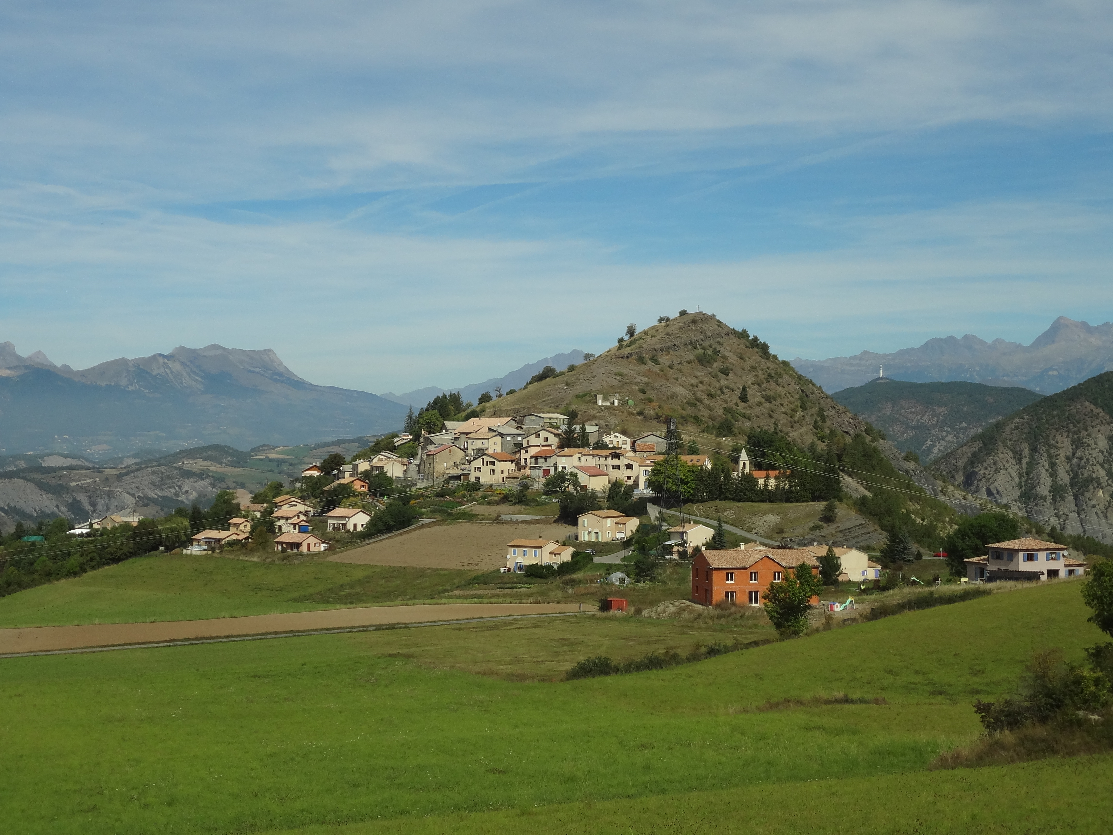 Vue de Piégut avec la colline Saint-Colomban (1125 m)